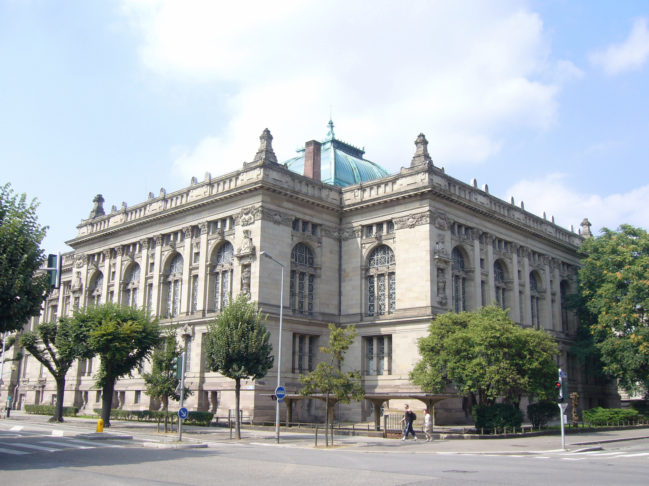 La Bibliothèque Nationale de Strasbourg